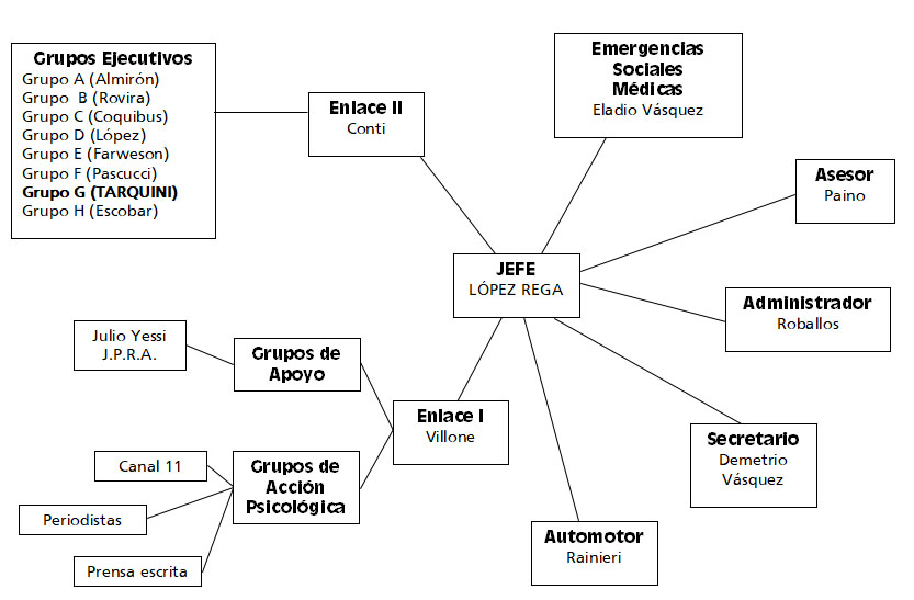 Organigrama de la Triple A incluyendo a Tarquini, según descrito en Paino Salvador, 1984